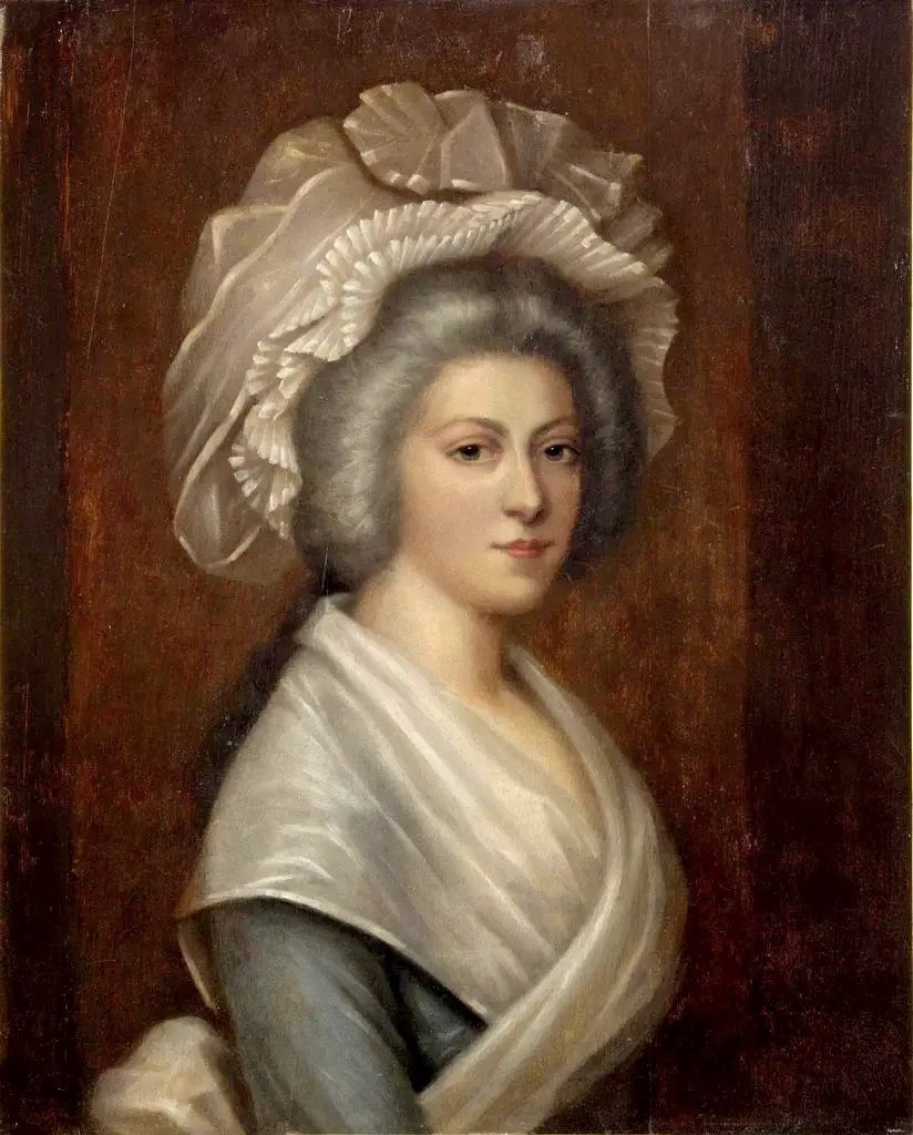 Madame Élisabeth (1764-1794) au Temple